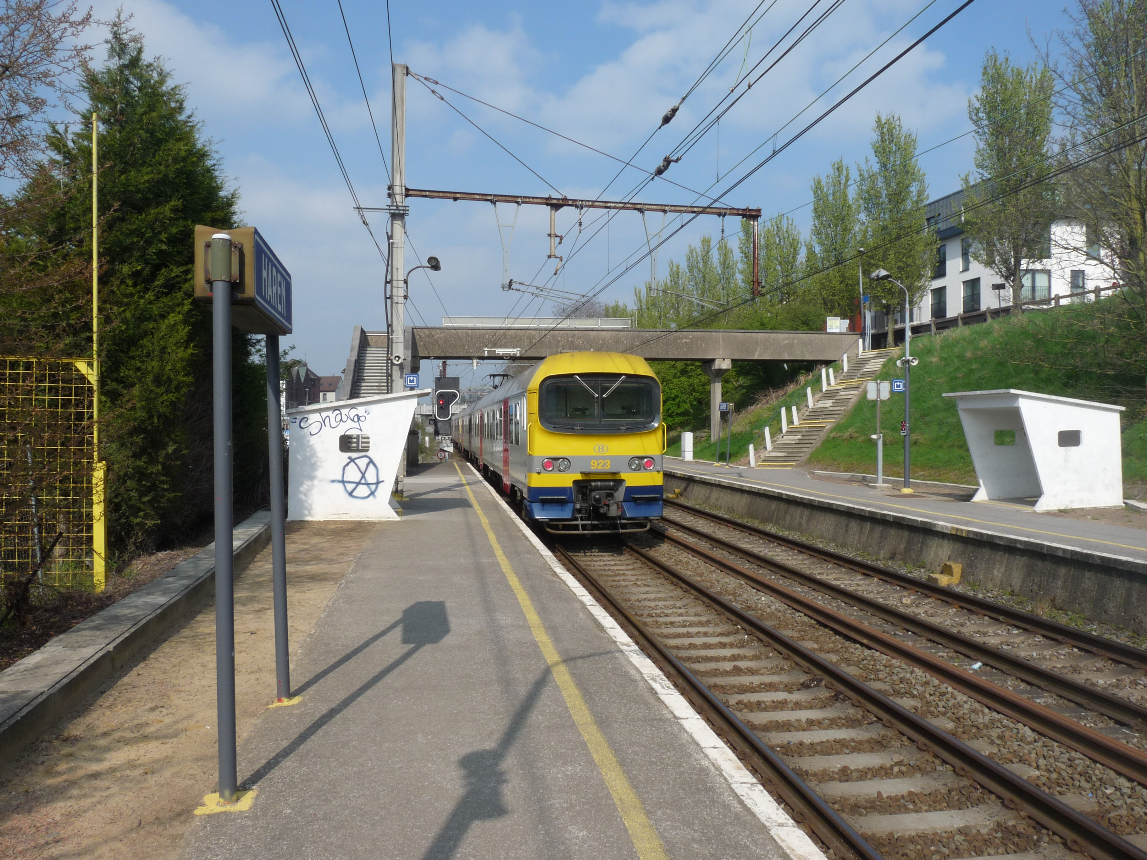 Halte Haren op de spoorlijn 26